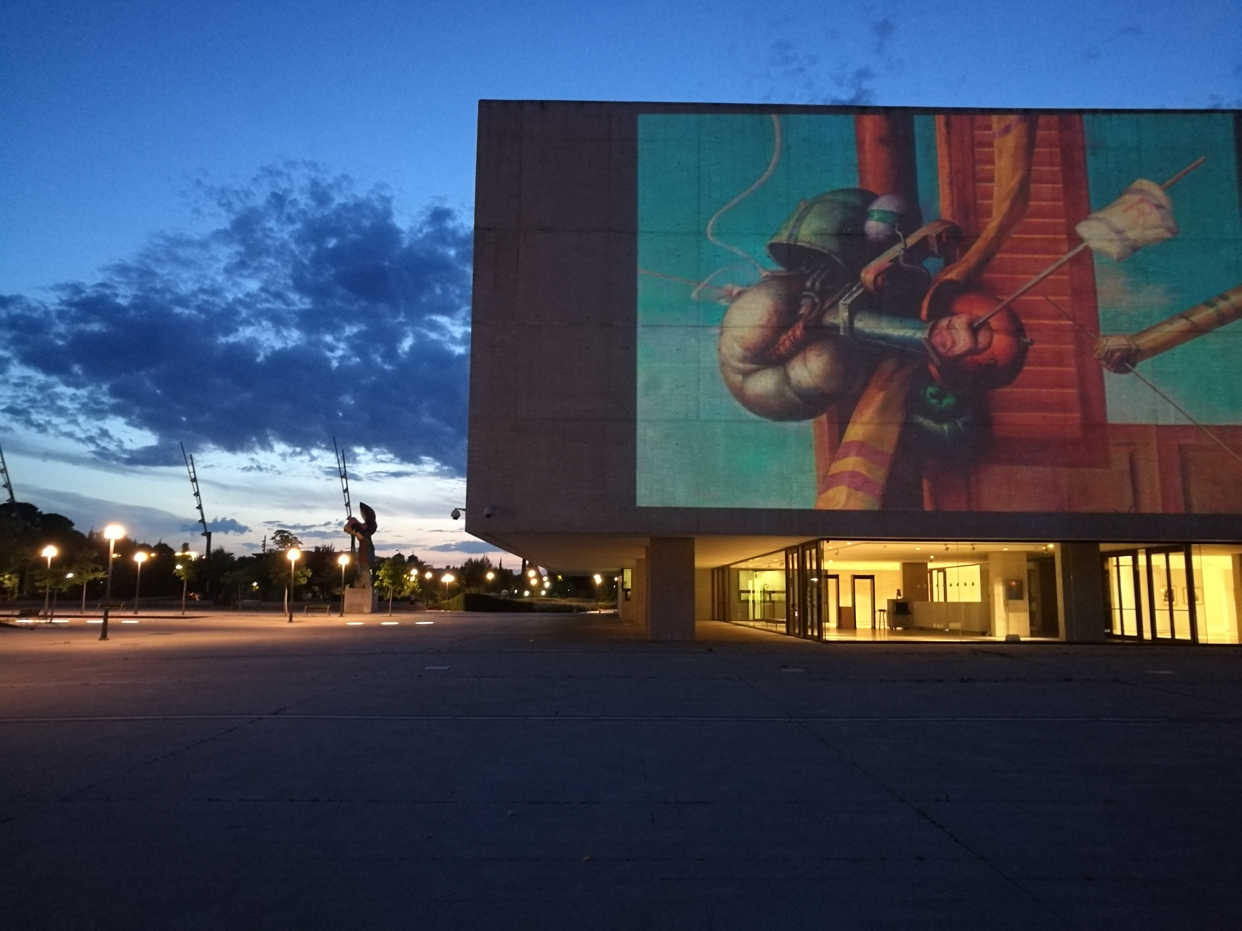 Proyección de un óleo de Luis Sáez en las Cortes de Castilla y León con motivo de la exposición "La belleza, el misterio y el dolor" dedicada al pintor. Valladolid, 25 de mayo de 2017